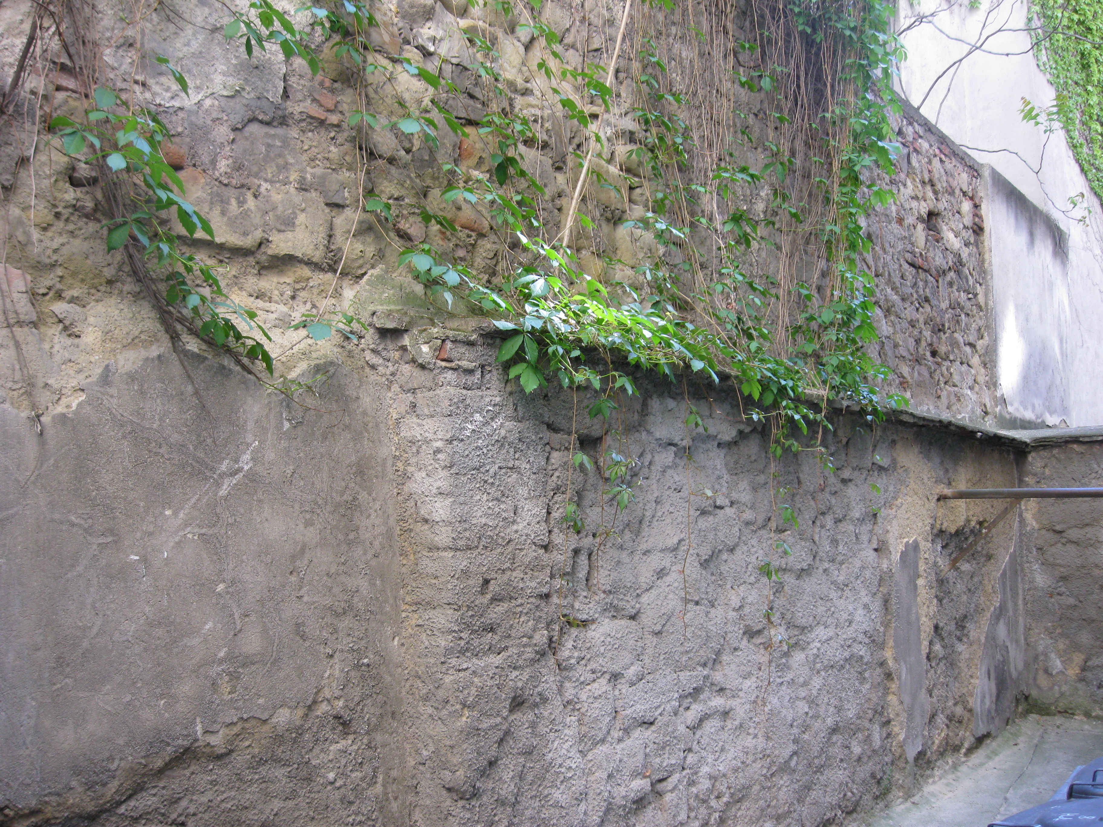 Letzte Reste der Ghettomauer (Aufnahme in der Tandelmarktgasse 8), welche das ehemalige Karmeliterkloster vom jüdischen Ghetto trennte. Denkmalgeschützt.